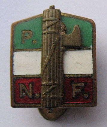 Insigne du Partito Nazionale Fascista